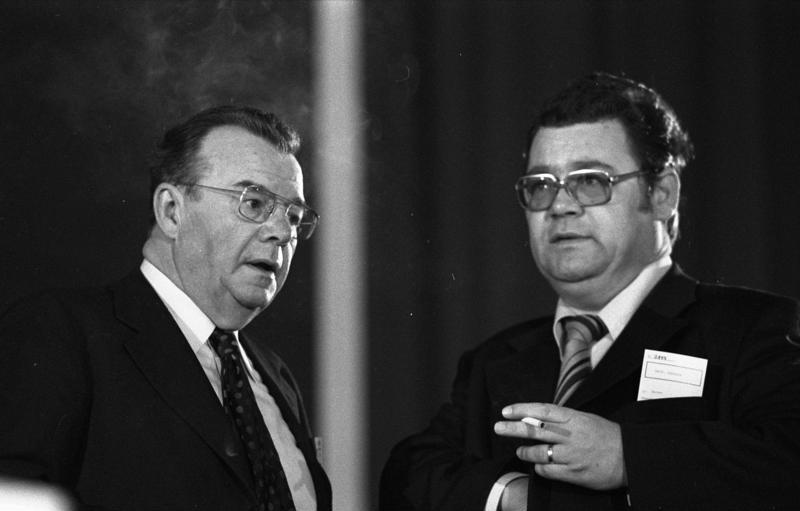 27. Bundesparteitag der F.D.P in Frankfurt am Main